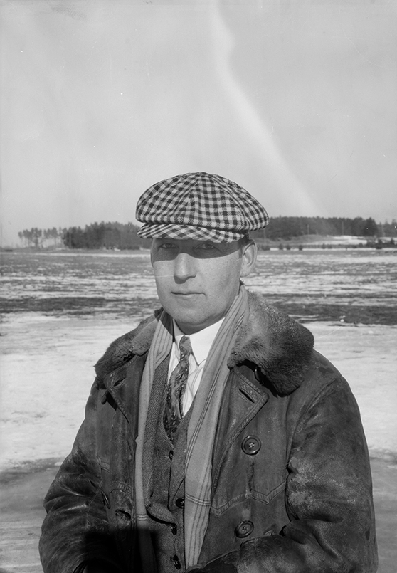 Porträtt av ingenjör Edmund Sparmann. Tillhör Gamla Malmen-samlingen. GM 1112. Ur Flygvapenmuseums bildarkiv.